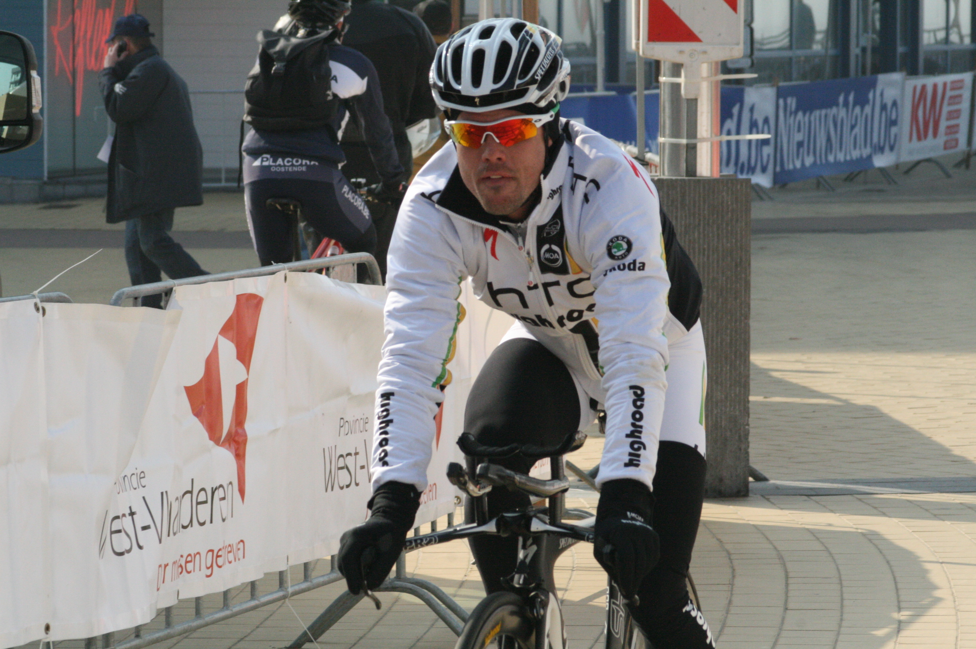 Trois jours de Flandre occidentale 2011